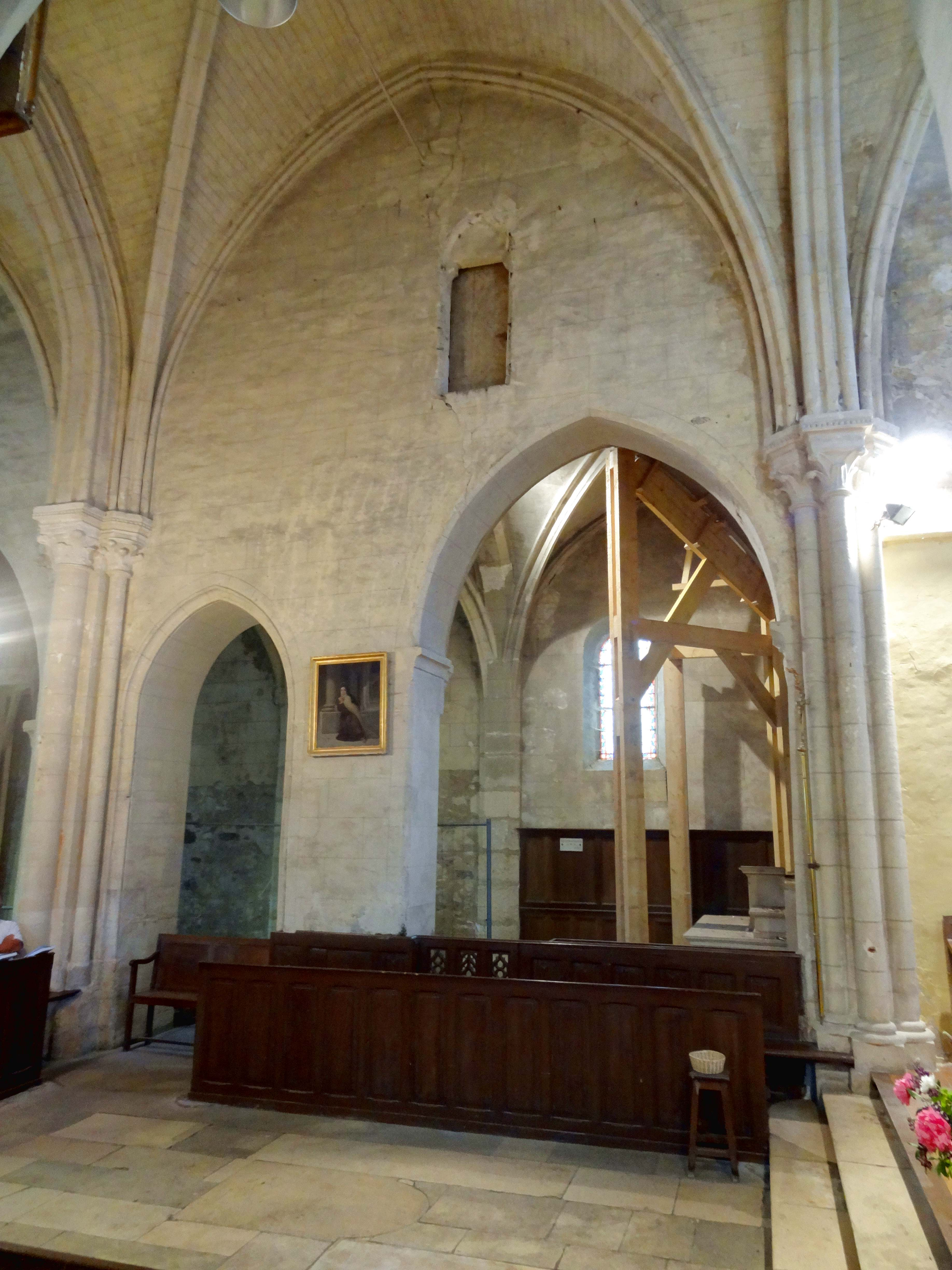 Intérieur de l'église - voir titre.